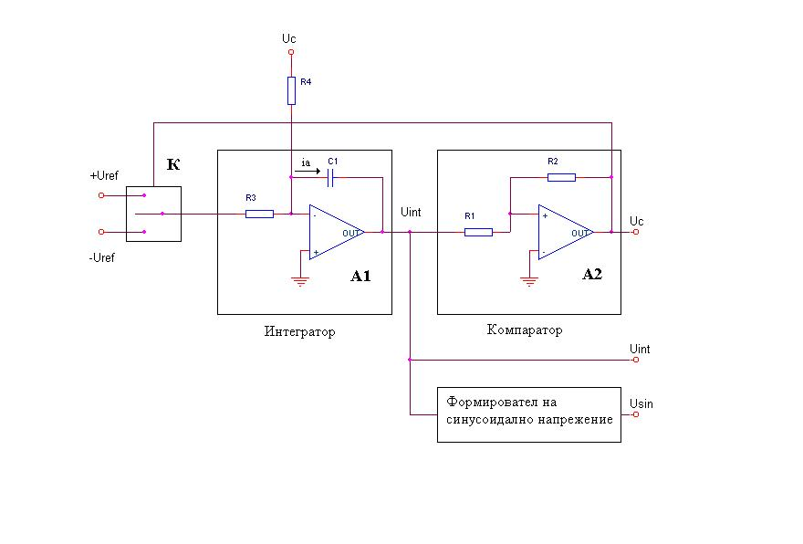 Основна схема на функционален генератор.